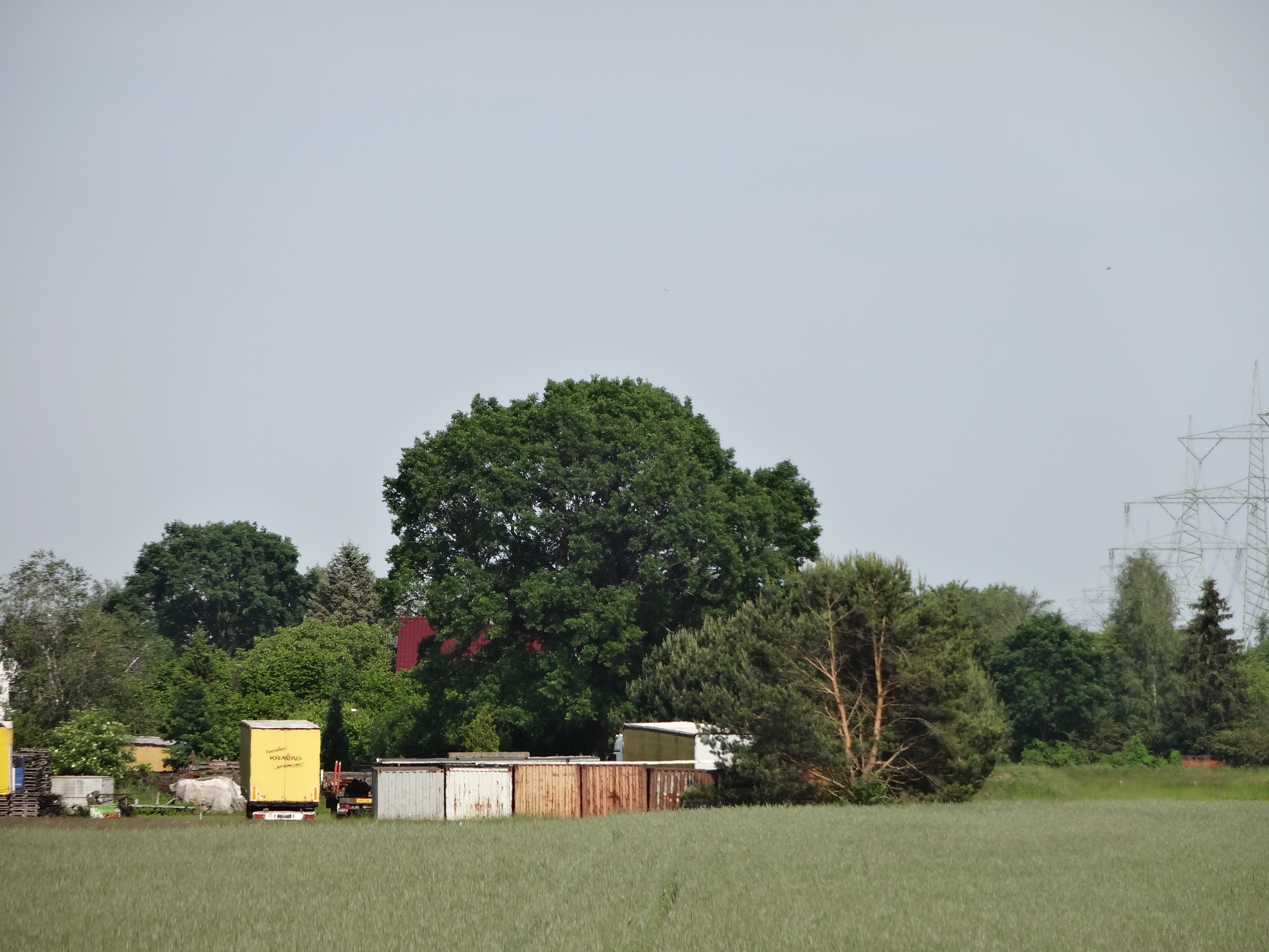 Naturdenkmal Stieleiche (Quercus robur) in Schwarzheide Elsterstraße 16; gesehen von der Bundesstraße 169; rechts 380-kV-Freileitung Bärwalde–Streumen